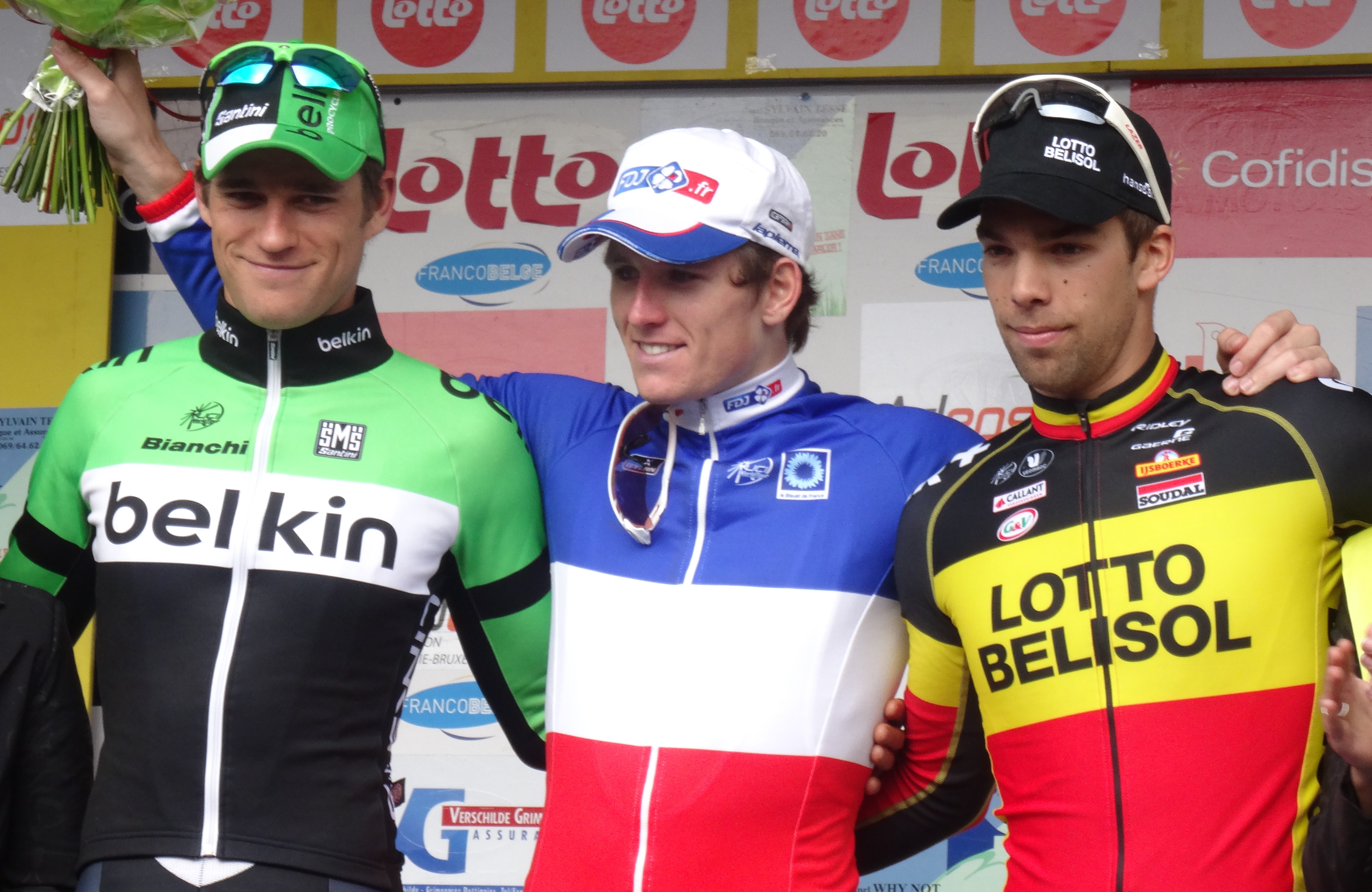 Reportage photographique réalisé le dimanche 5 octobre à l'occasion de l'arrivée de la quatrième étape de l'Eurométropole Tour 2014 à Tournai, Belgique.